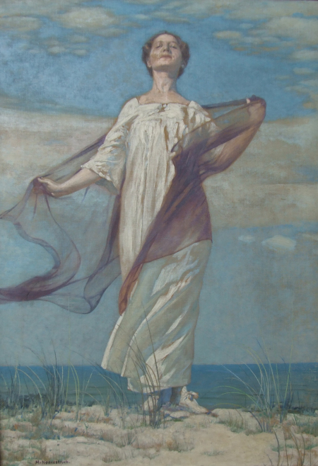 Frau auf einer Düne (Öl auf Leinwand, 62 × 85 cm) von Max Nonnenbruch